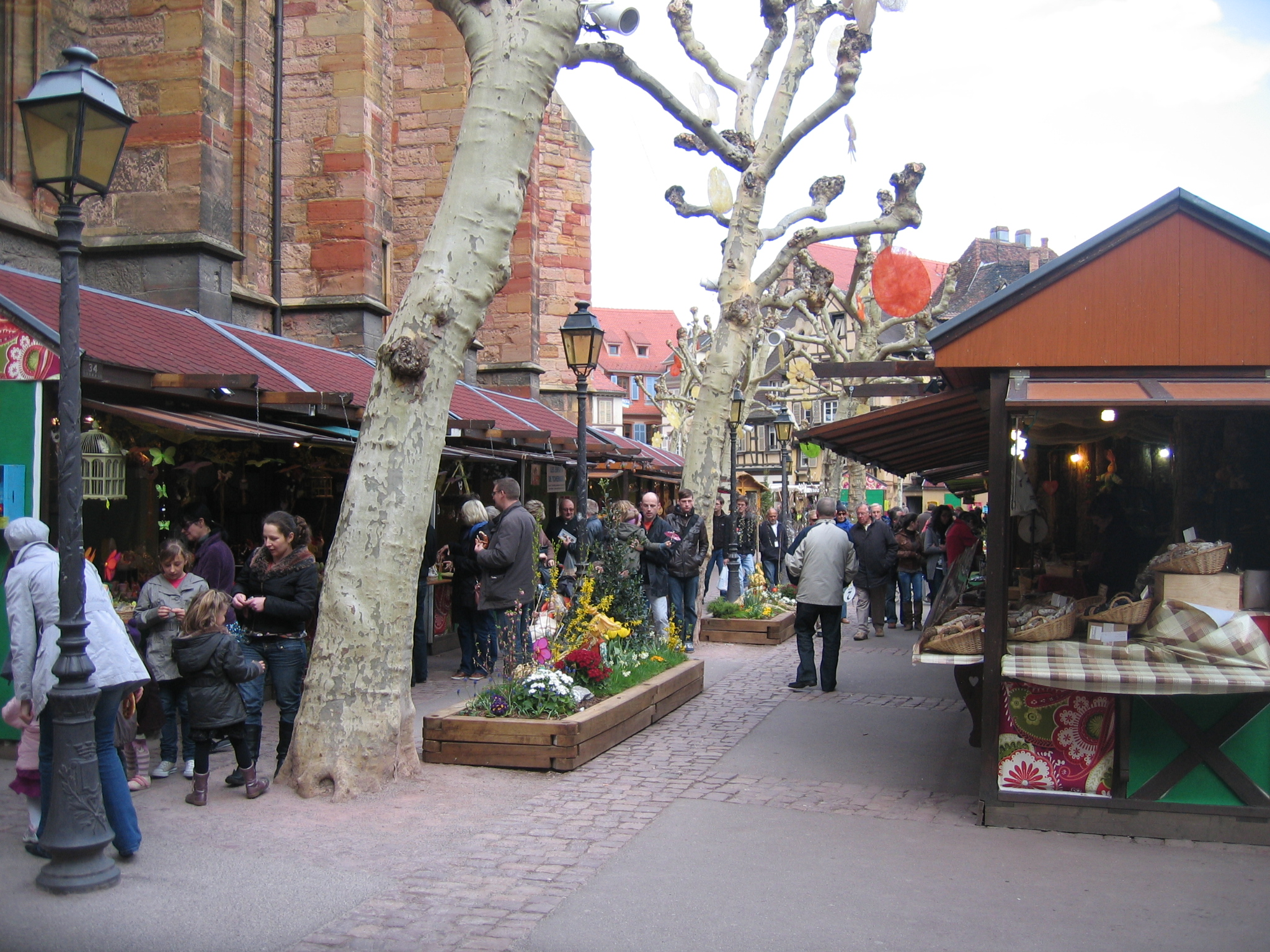 Le marché de Pâques, place des Dominicains